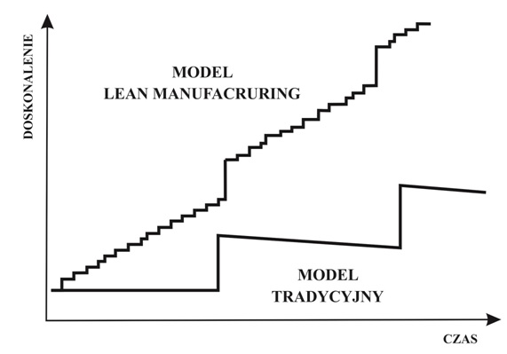 Model Lean Manufacturing (Kaizen) a model tradycyjny do doskonalenia